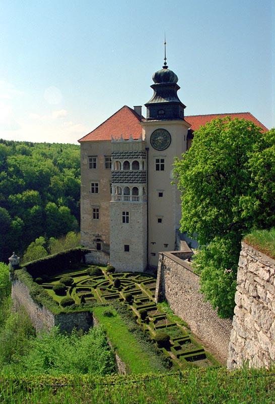 Pieskowa Skala Castle in Malopolska (Poland)